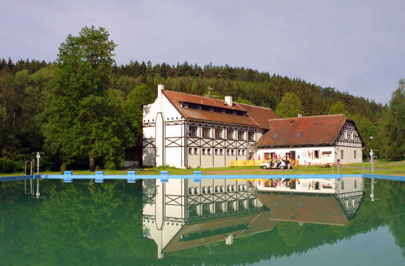 Rekreační středisko Machův Mlýn na Javornici.